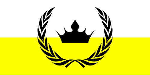 A rendition of the flag of Enclava micronation, smplified to avoid possible copyright infringements